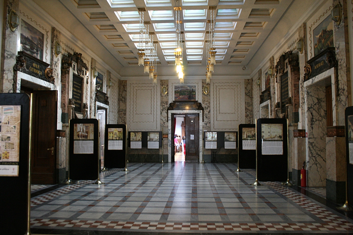 Aula Hrvatskog državnog arhiva